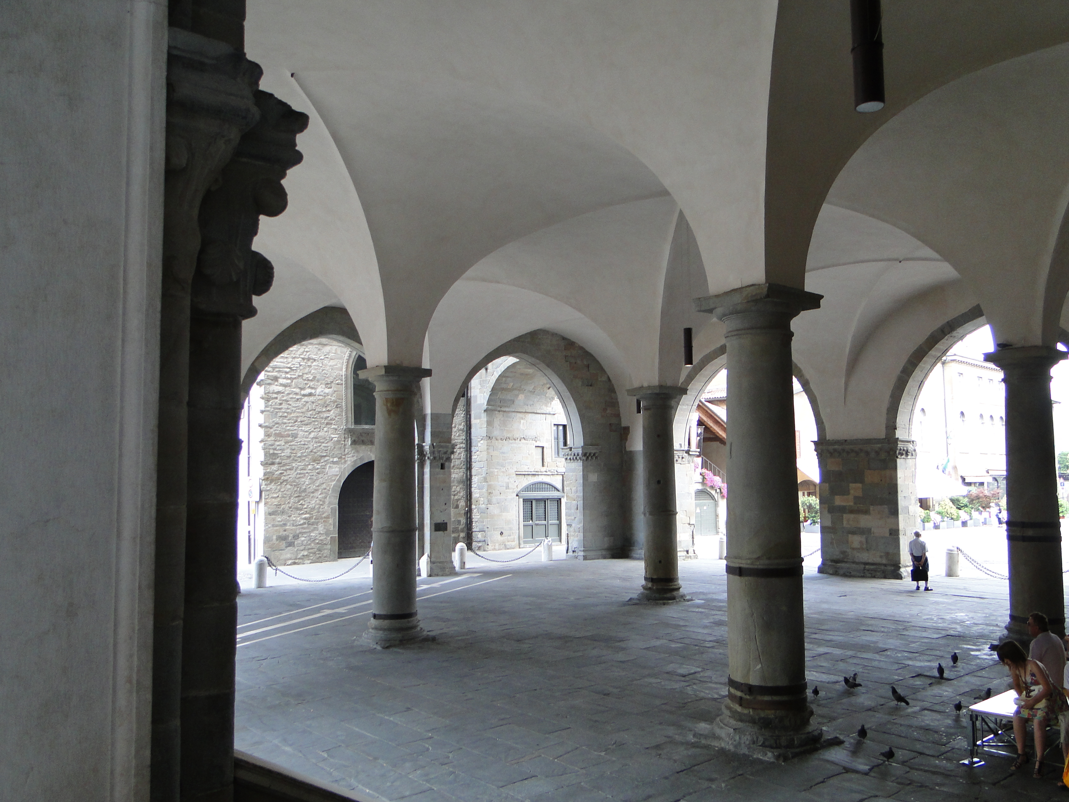 Loggiato del Palazzo della Ragione, Bergamo, Italia